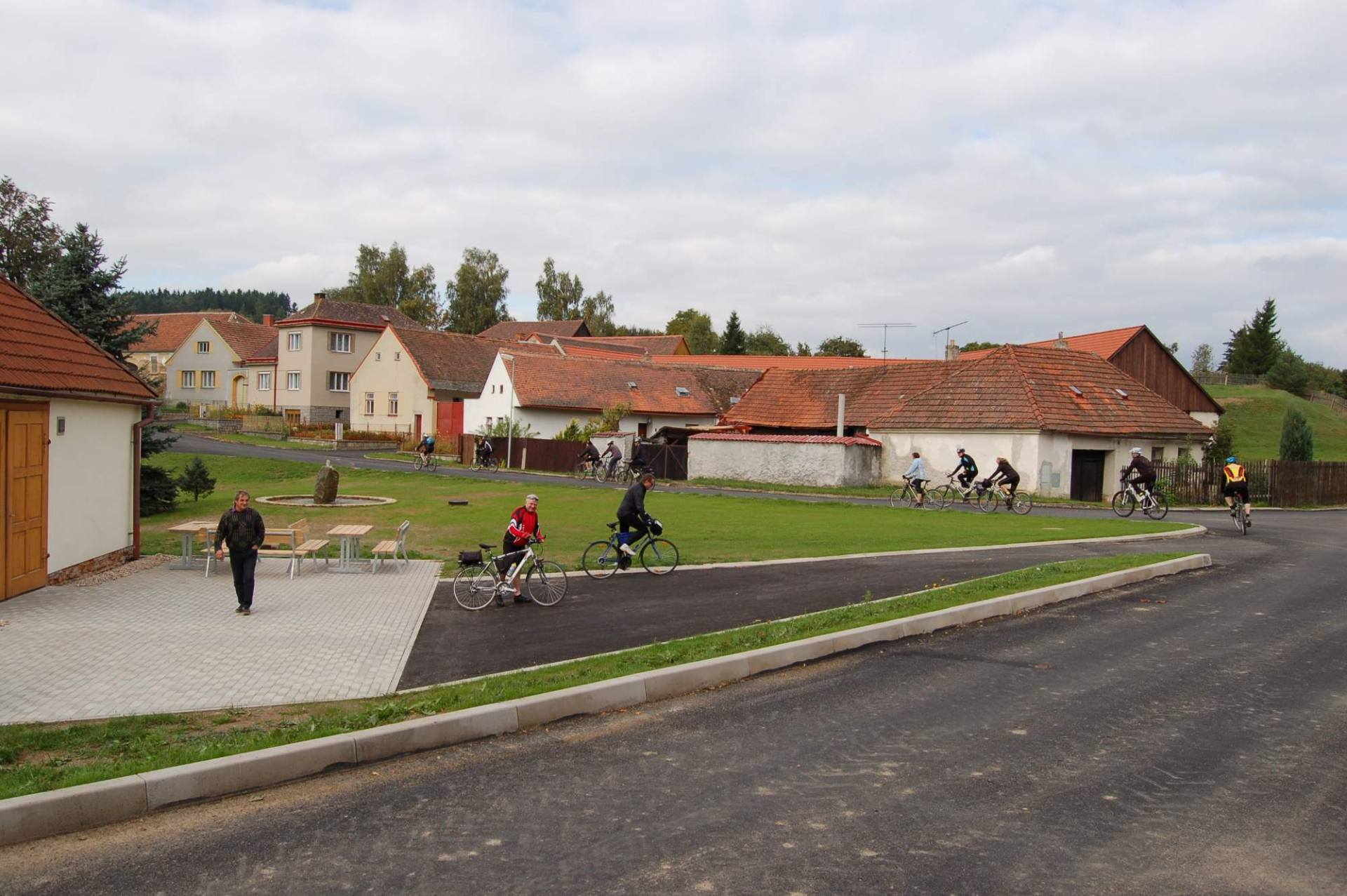 Cyklovýlet Po stopách regionu Renesance